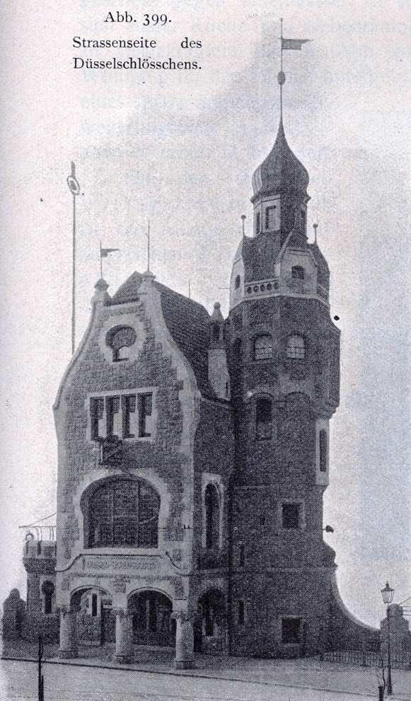 Düsseldorf und seine Bauten